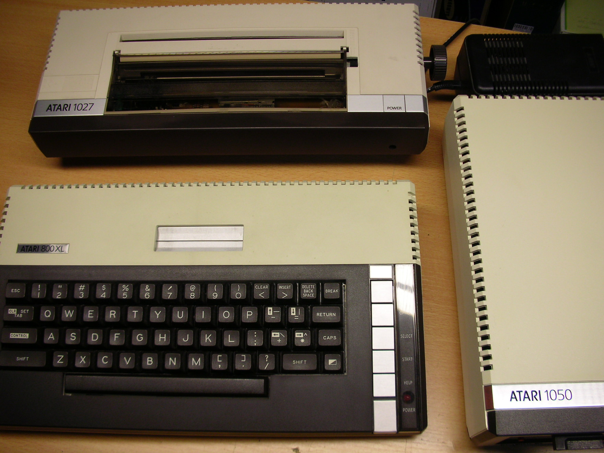 Atari 800XL Heimcomputer mit Floppy und Drucker